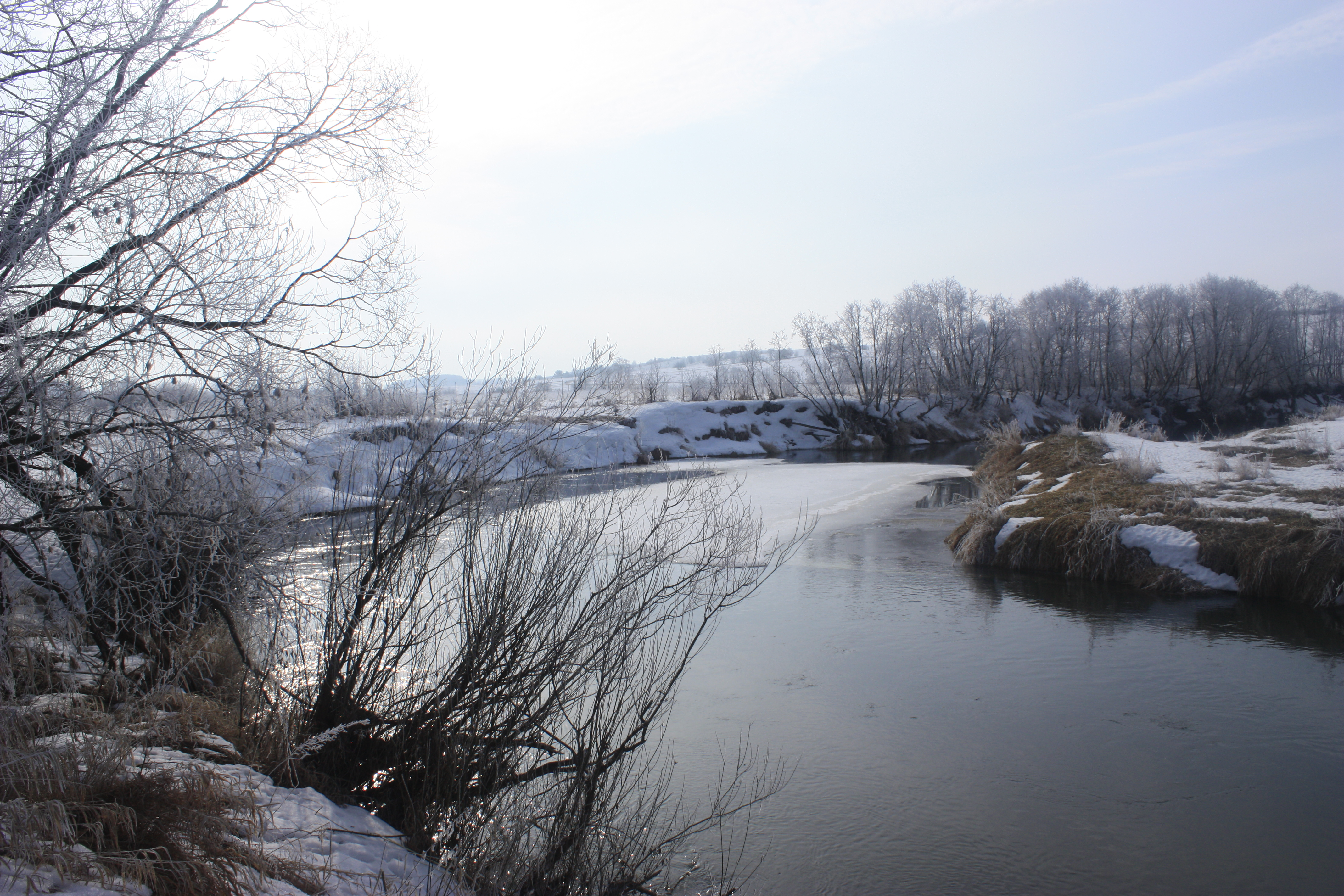 Река вихра зимой.